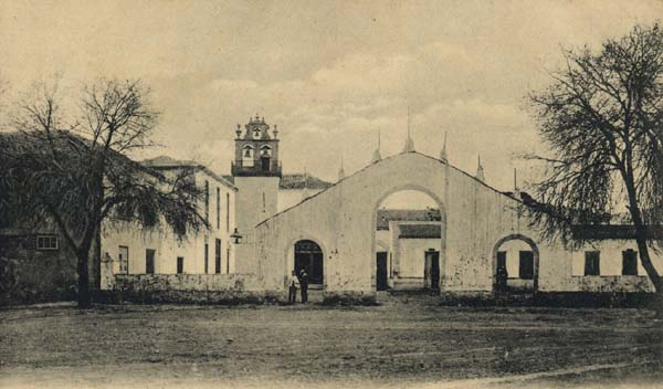 Plaza e Iglesia del Cristo (1890-1895)